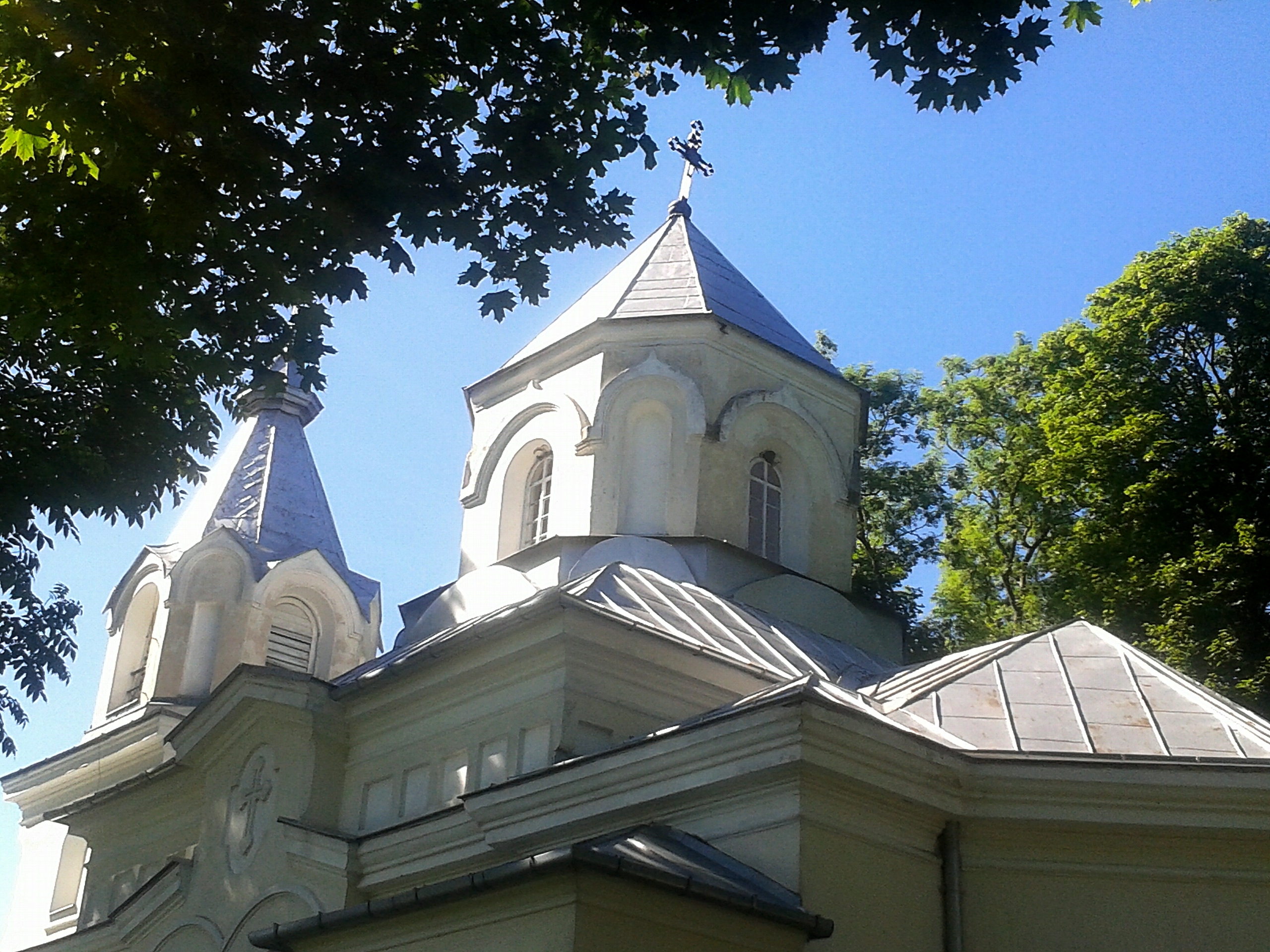 Kopuła kościoła (dawnej cerkwi) w Gnojnie